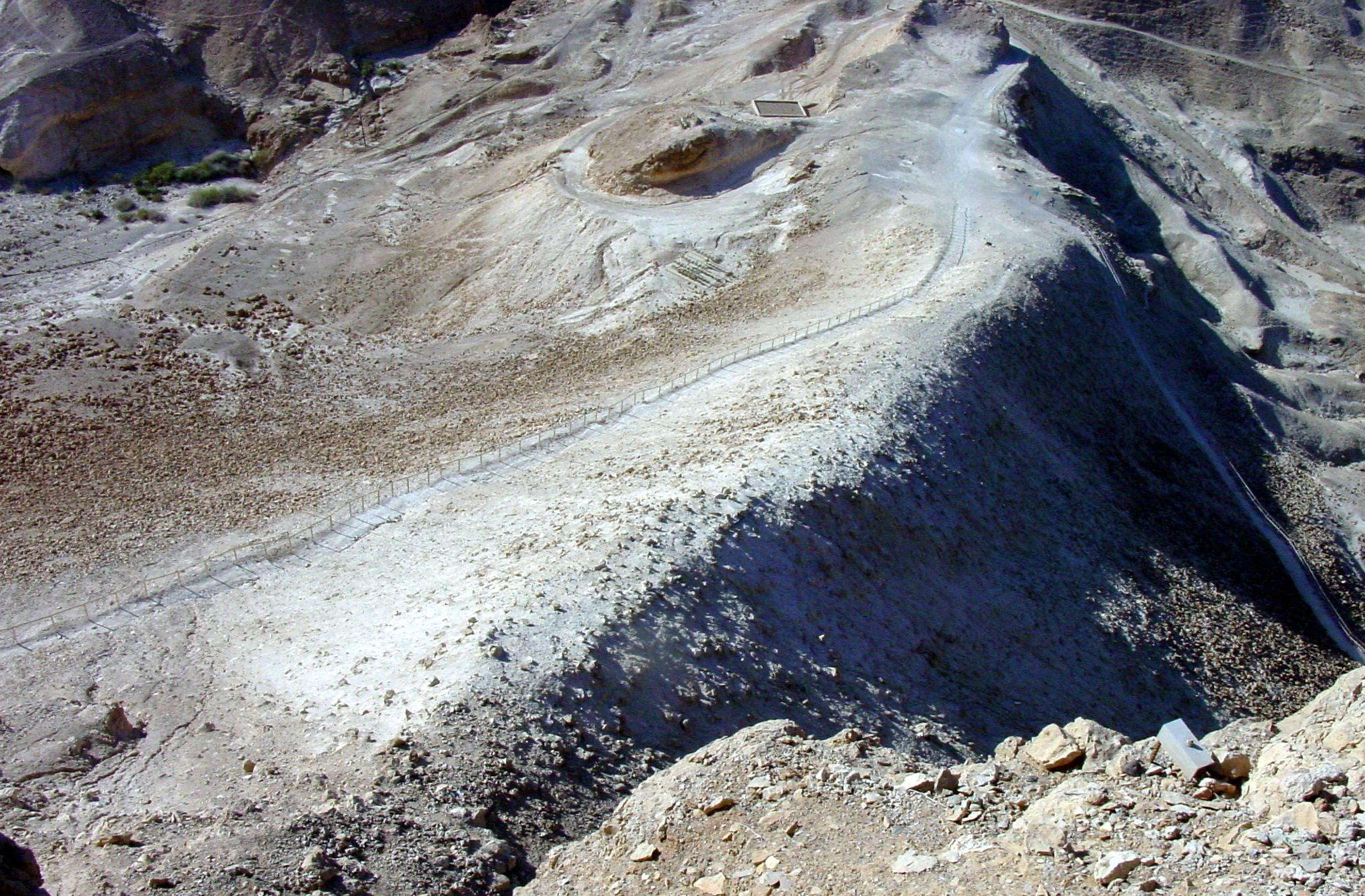 Рампа коју су изградили Римљани, Масада, Израел (слику направио Борис Малагурски) ☺ Ову слику је направио Борис Малагурски.